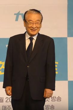 16일 오전 서울시 마포구 도화동 베스트웨스턴프리미어 서울가든호텔에서 tvN 새 금요드라마 '쌉니다 천리마마트' 제작발표회가 열려 배우 가 참석해 포토타임을 갖고 있다.